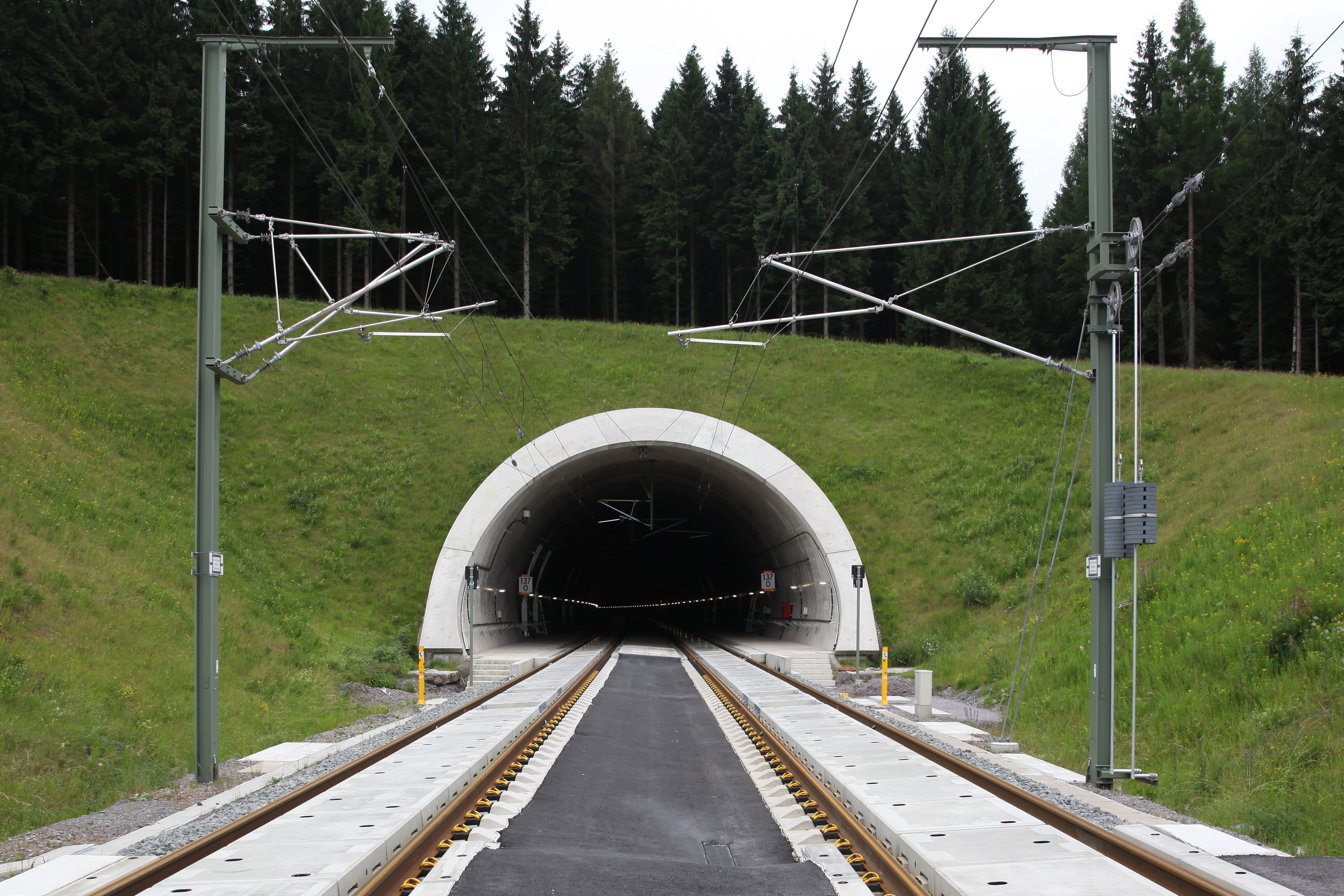 Nordportal Tunnel Masserberg